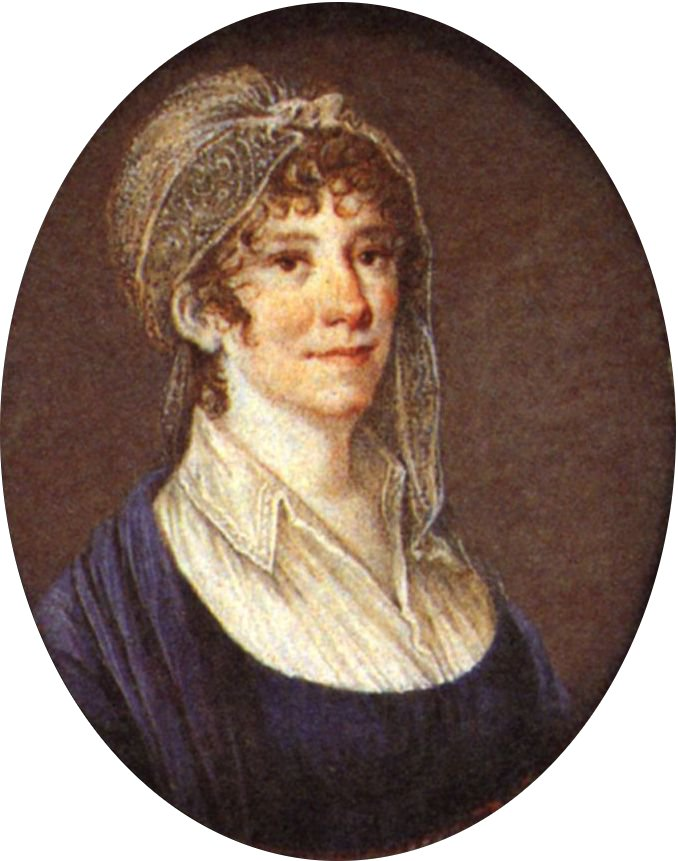 Miniatur-Gemälde von Therese Huber